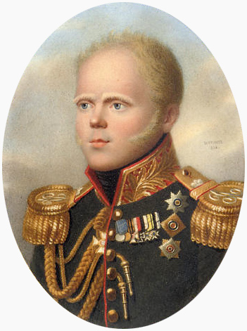 Портрет великого князя Константина Павловича Grand Duke Constantin Pavlovich (1778-1831), in general's uniform, red-piped black coat, gold-embroidered red collar, gold aiguillette and epaulettes, wearing the breast-star of the Imperial Russian Order of St. Andrew, the jewel and breast-star of St. George (2nd class), the Order of St. Vladimir, the Austrian Order of Maria Theresa, the Prussian Iron Cross, the Württemberg Military Merit (Knight class), the Bavarian Military Order of Max-Joseph, and medals including the 1812 Campaign; sky background signed and dated 'Benner 1818' (mid-right) on card oval, 5¼ in. (33 mm.) high, rectangular gilt-metal mount within giltwood panel